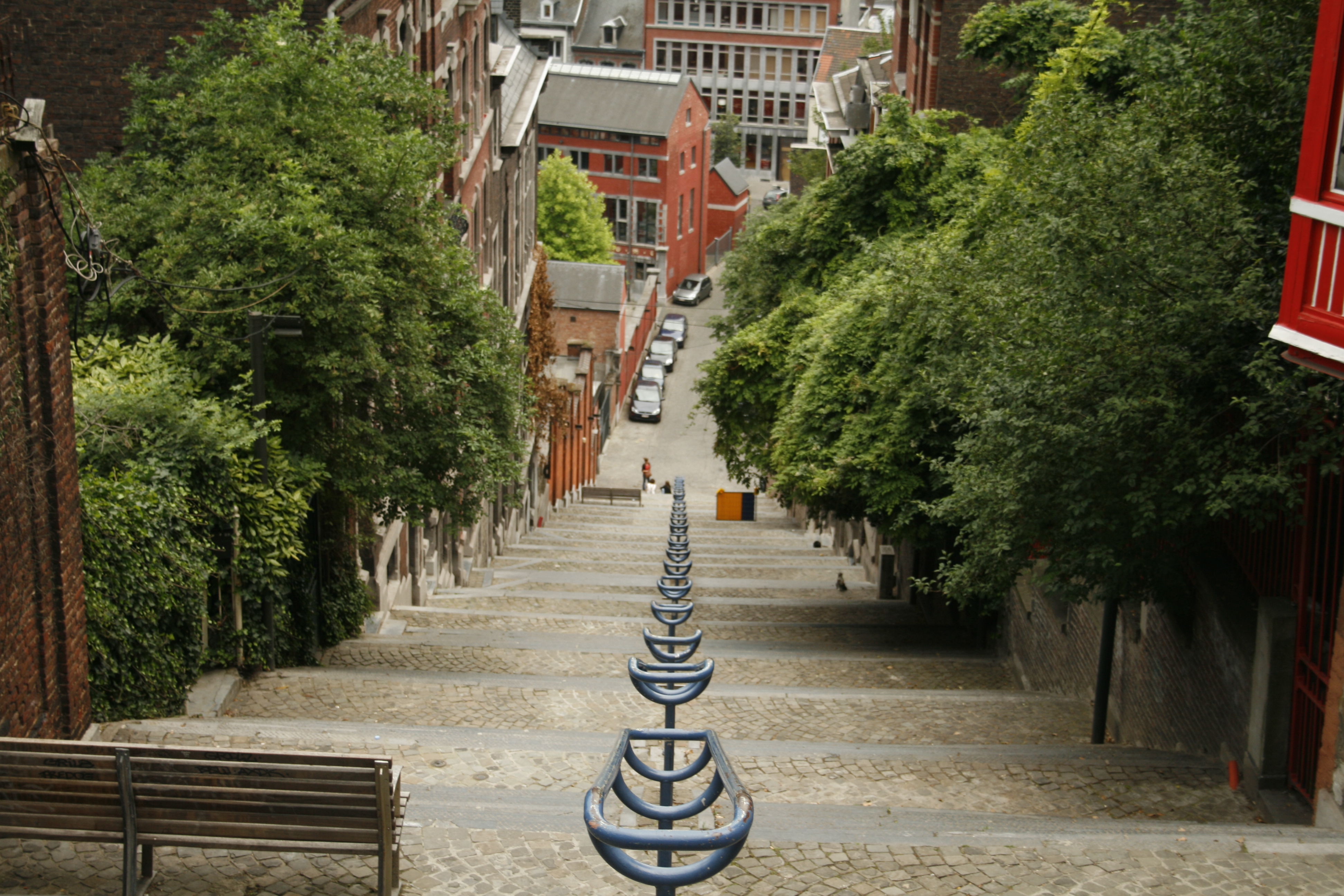 Vue vers le bas de l'escalier de Bueren, vers la fin de la descente